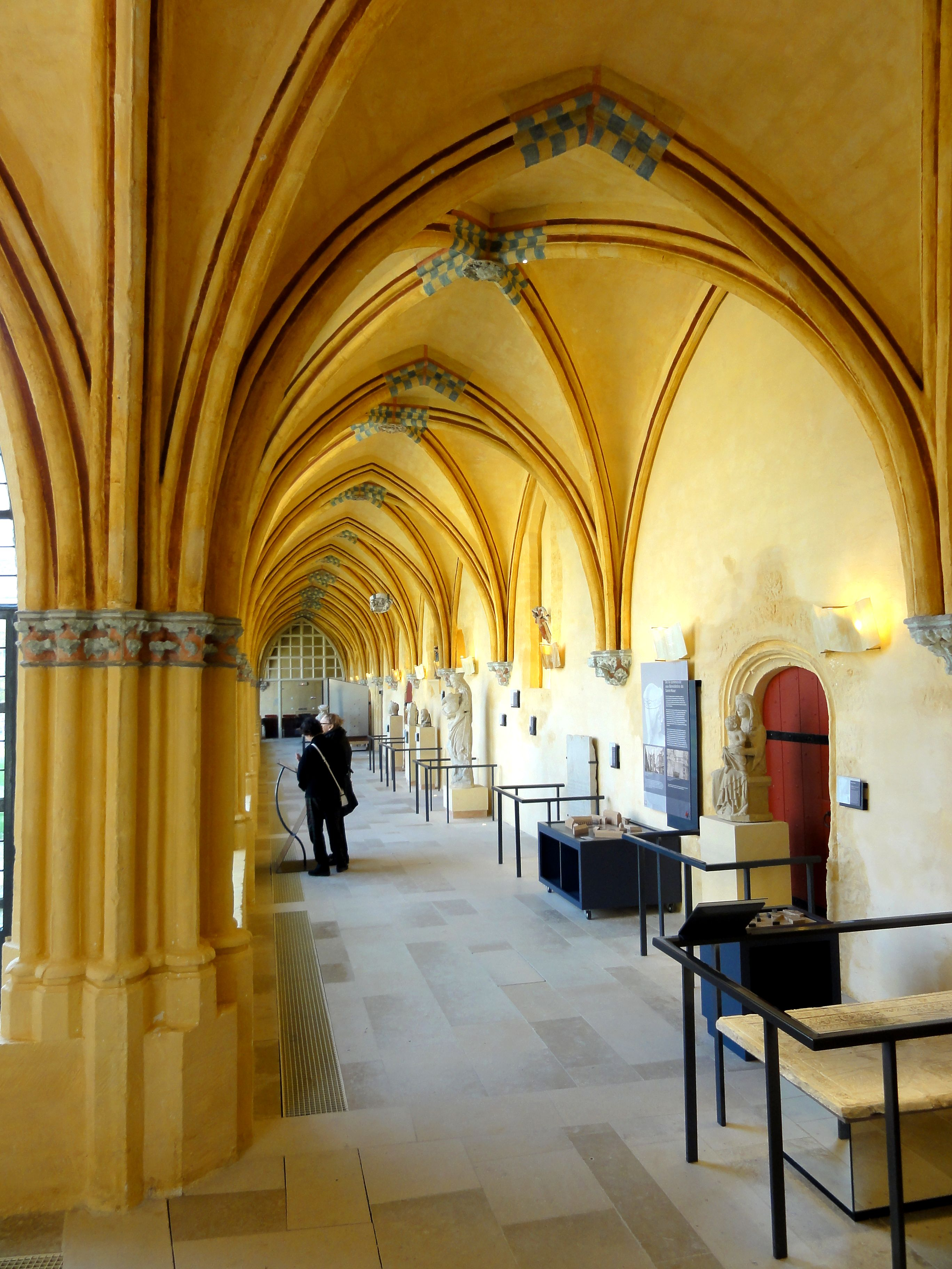 Galerie occidentale du cloître.